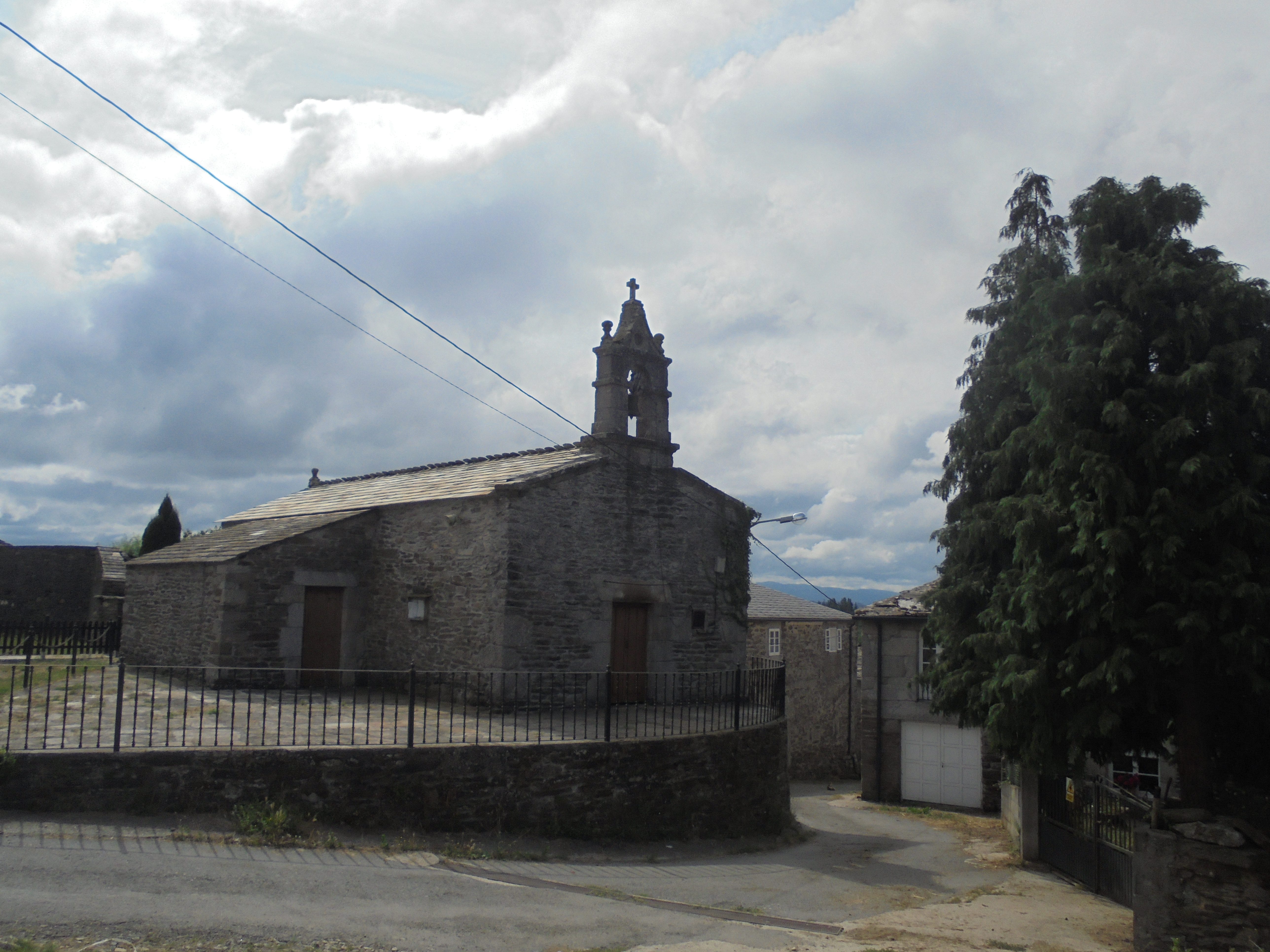 Igrexa de San Cosme de Manán ( O Corgo)